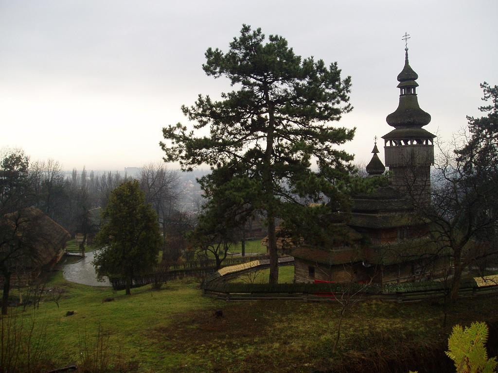 fotky z vyletu na ukrajine